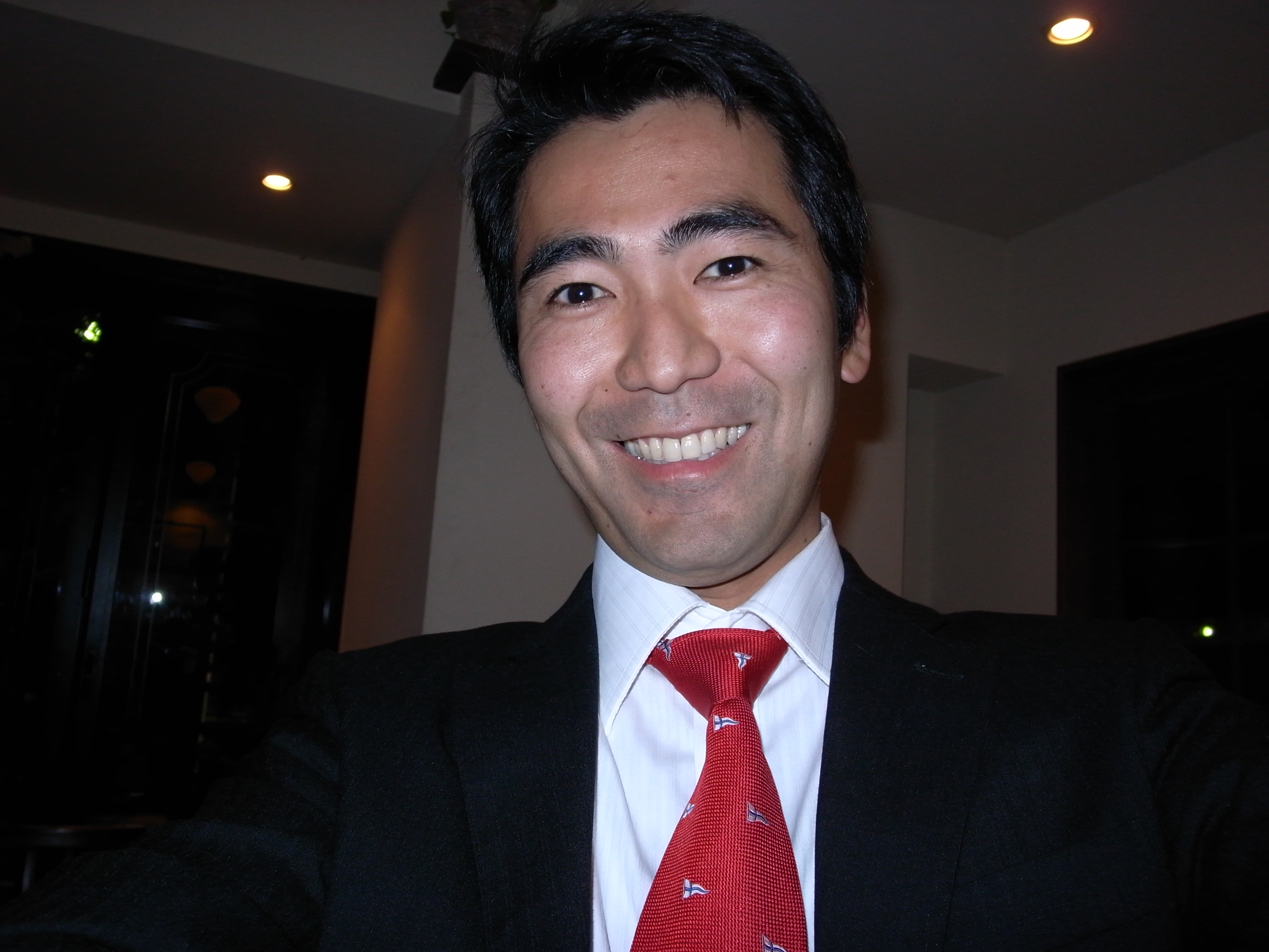 横須賀市会議員